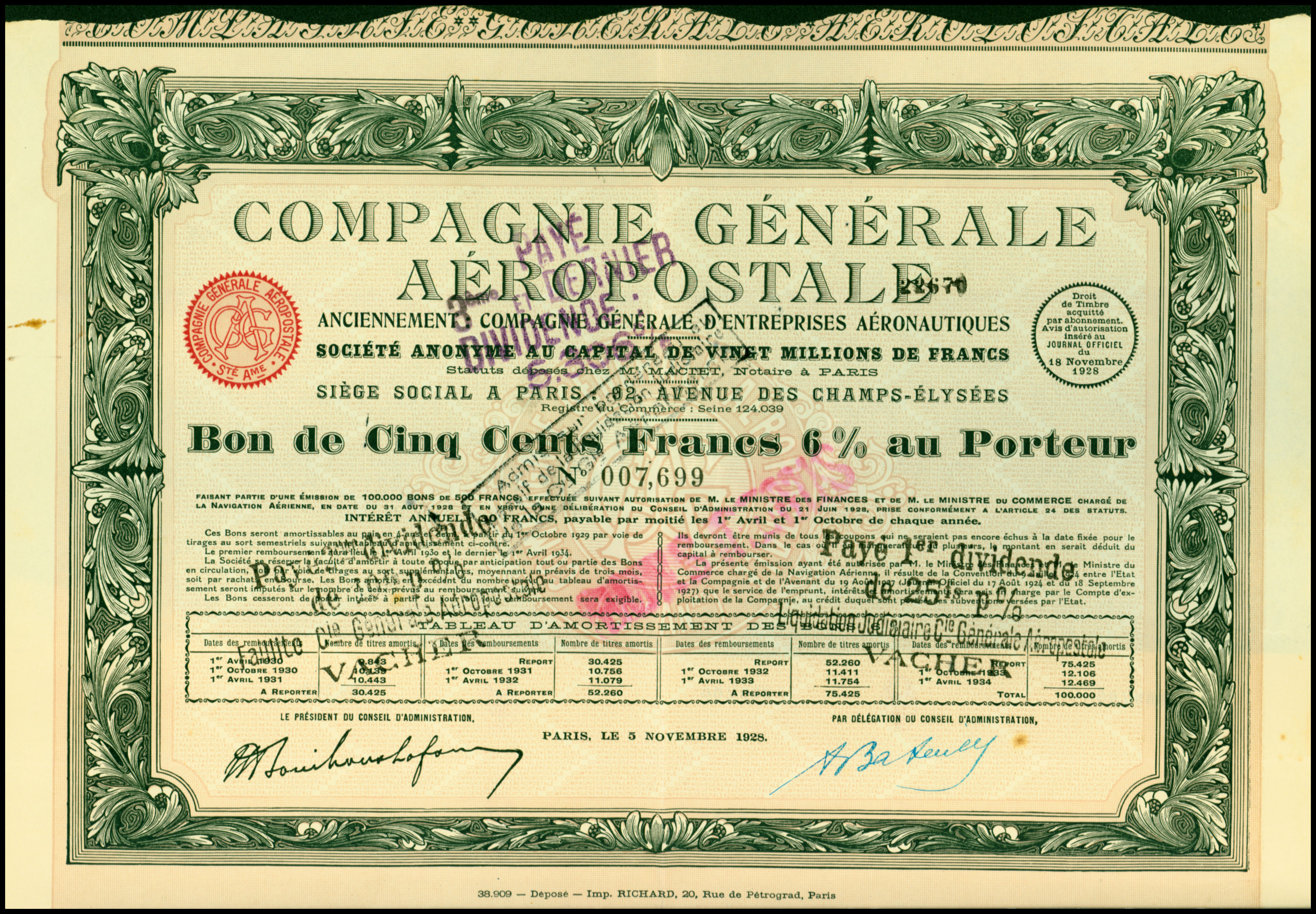 Bon über 50 Frances der Compagnie Générale Aéropostale vom 5. November 1928